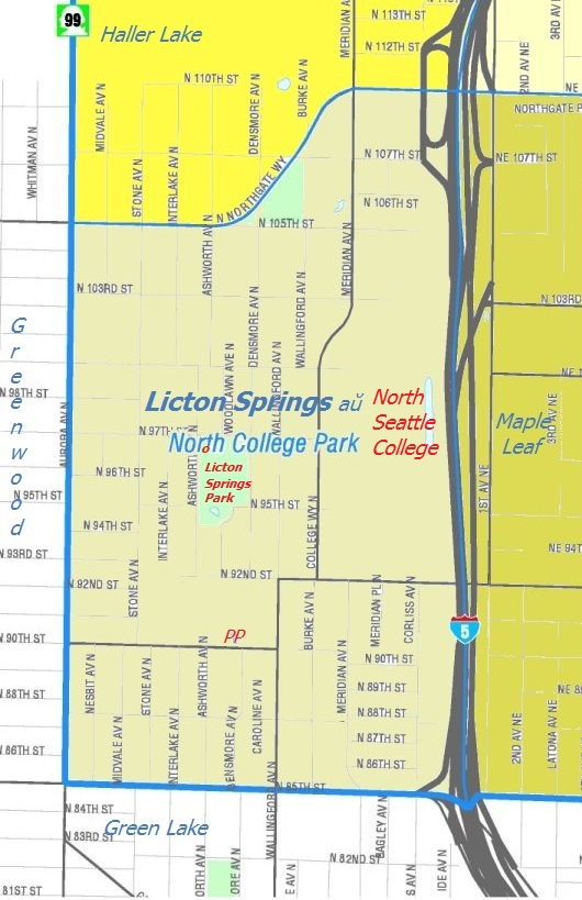 Mapo de kvartalo Licton Springs, bazita sur , kun aldono de apudaj nomoj, de Licton Springs, de la parko,ktp. Ruĝa markas la lokon de la akvofonto, kaj PP markas la mediprotektan parketon por sovaĝaj birdoj "Pillings Pond"